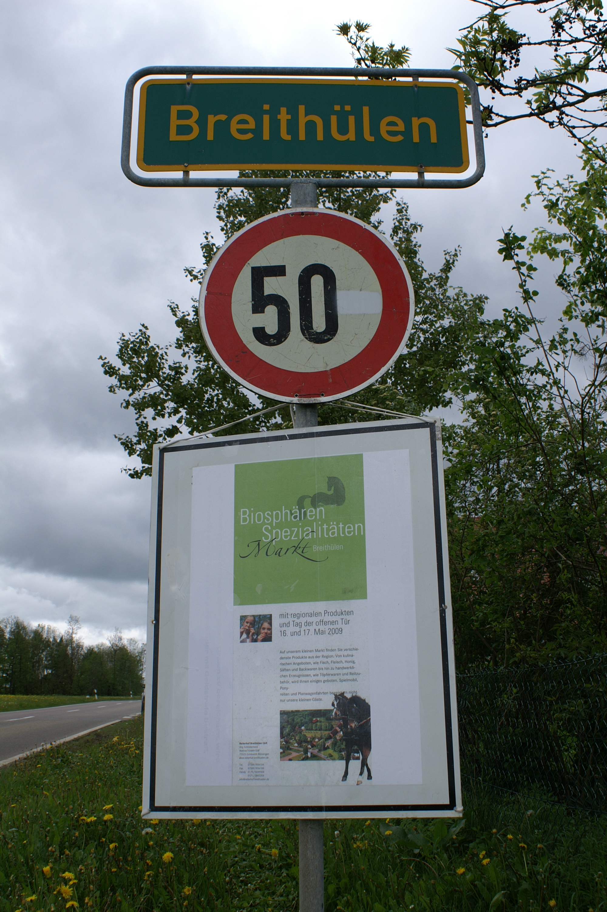 Breithülen liegt im Südosten des Biosphärengebietes Schwäbische Alb